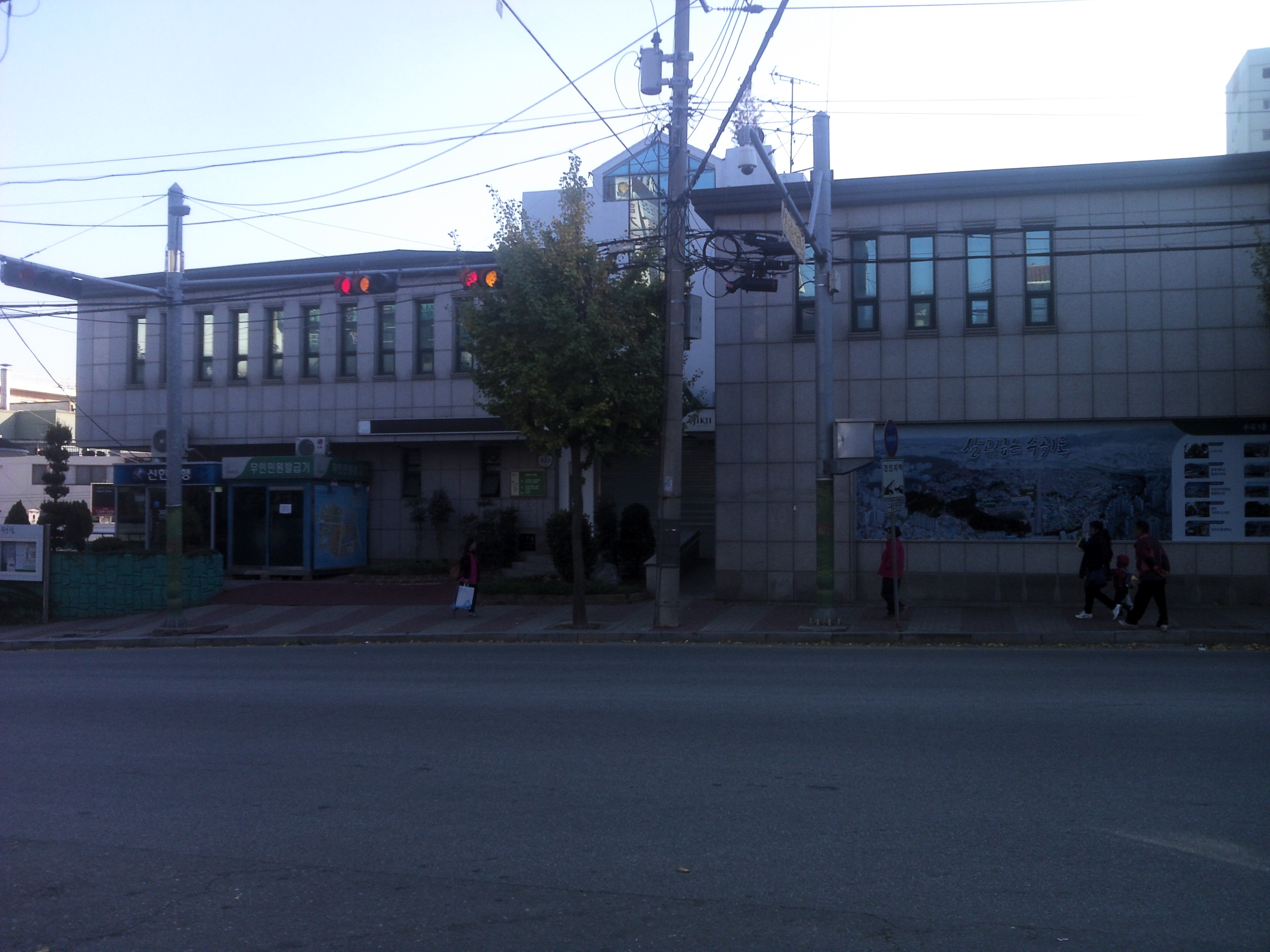 청주시 수곡1동 주민센터